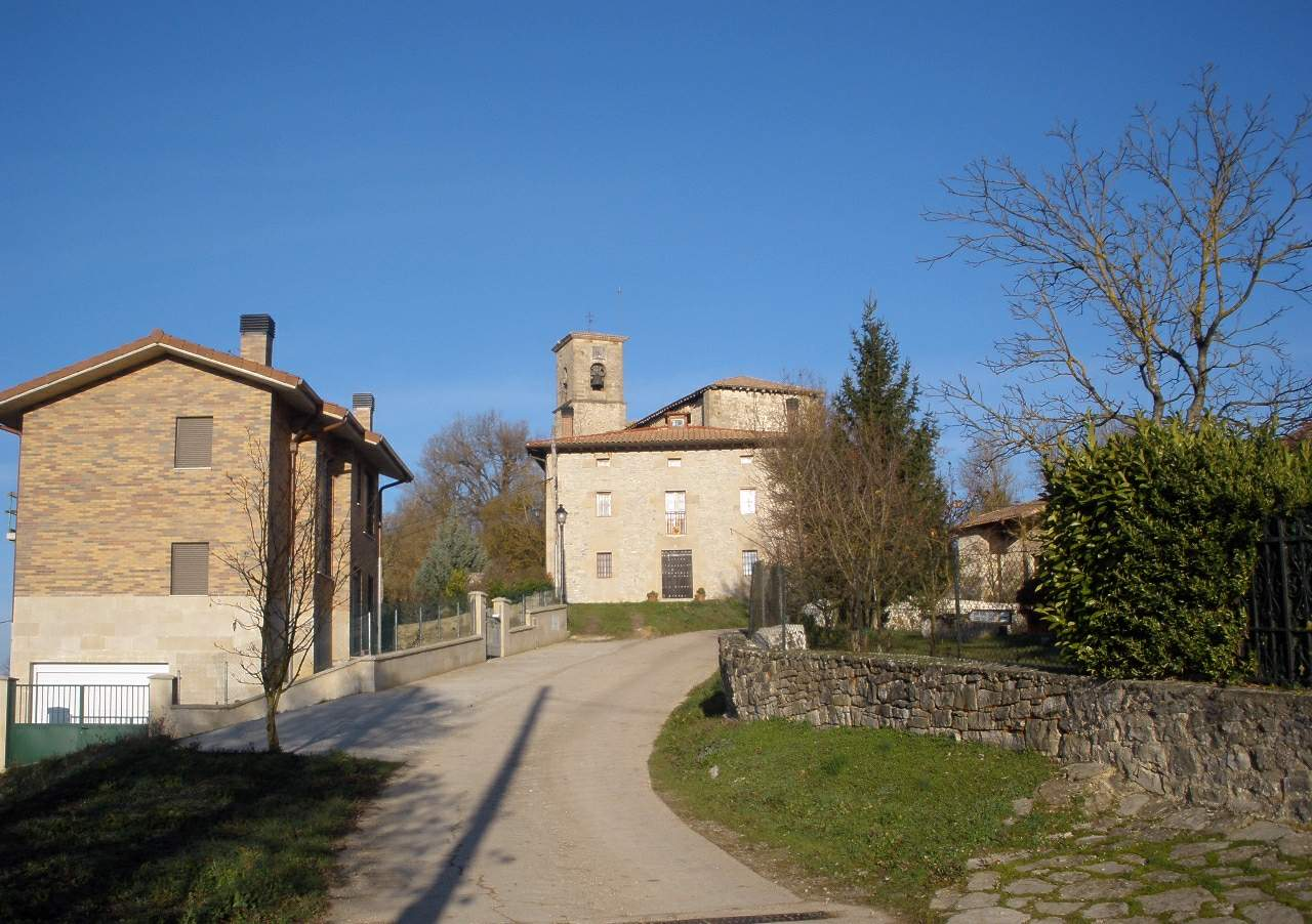 Maturana (Álava)